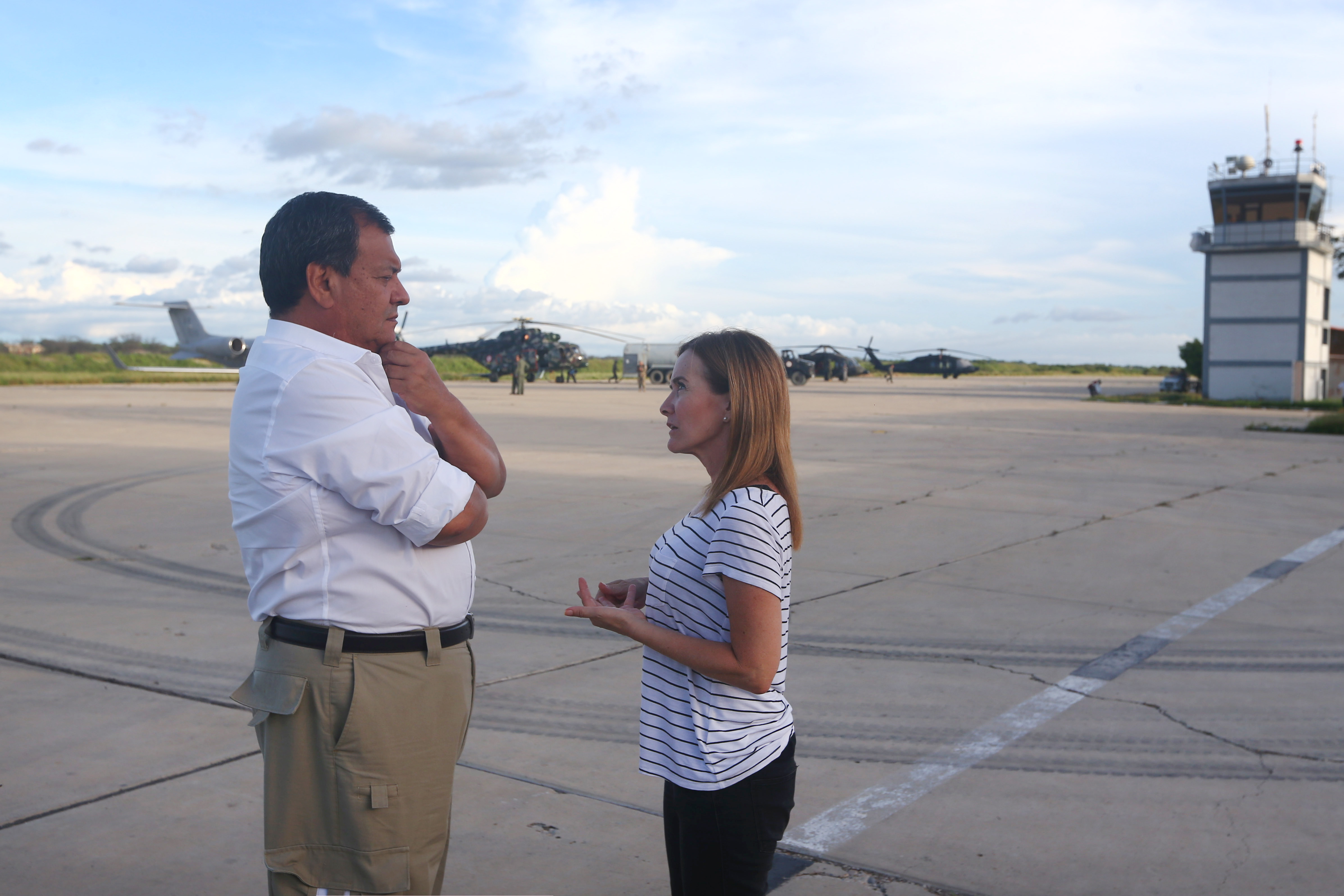 Ministro de Defensa supervisó instalación de cien carpas en el distrito de Castilla a cargo del Ejército. El ministro de Defensa, Jorge Nieto Montesinos, supervisó en el distrito de Castilla la instalación de uno de los seis refugios que se viene alistando en Piura, con la participación del Ejército del Perú, para albergar a las familias que pudieran perder o hayan perdido su hogar a consecuencia de las inundaciones y huaicos. El titular de Defensa señaló que las autoridades municipales serán las encargadas de elaborar las listas de los beneficiarios, en coordinación con la ministra de Salud, Marilú Martens, quien se encuentra en Piura para hacer un seguimiento de las acciones que viene llevando a cabo el Gobierno ante esta situación.